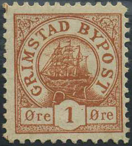 Почтовая марка местной почты в Гримстаде (Норвегия), 1887